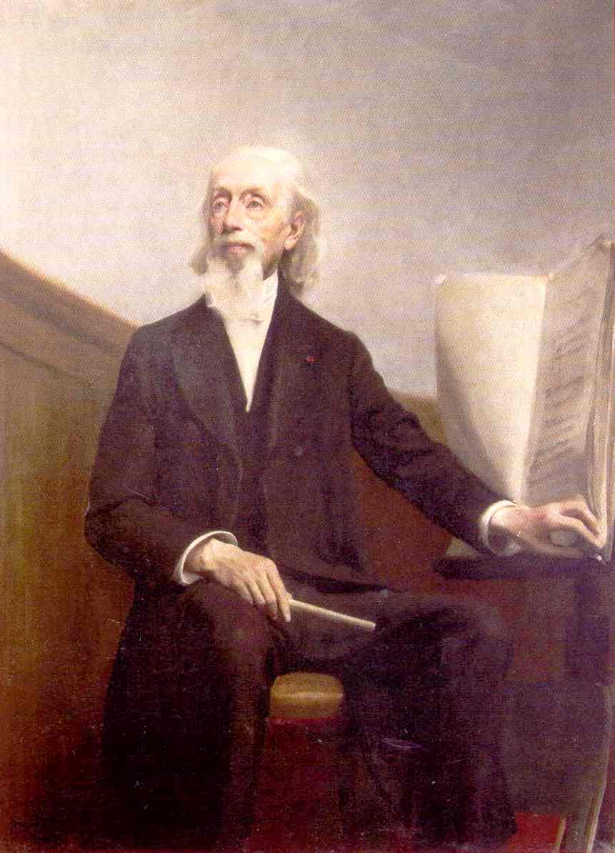 Portrait de François-Auguste, baron Gevaert